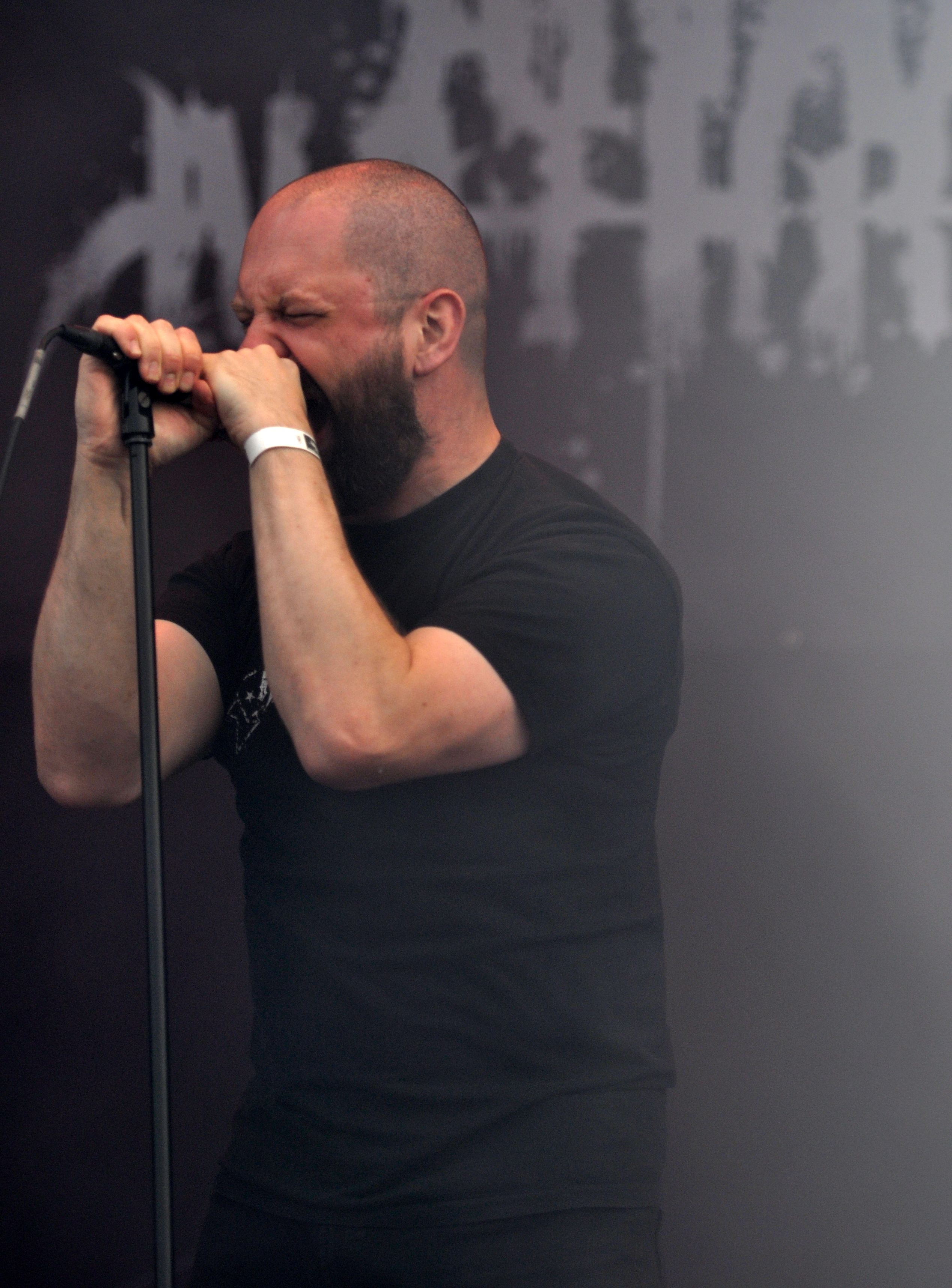 Anaal Nathrakh at Party.San Metal Open Air 2013